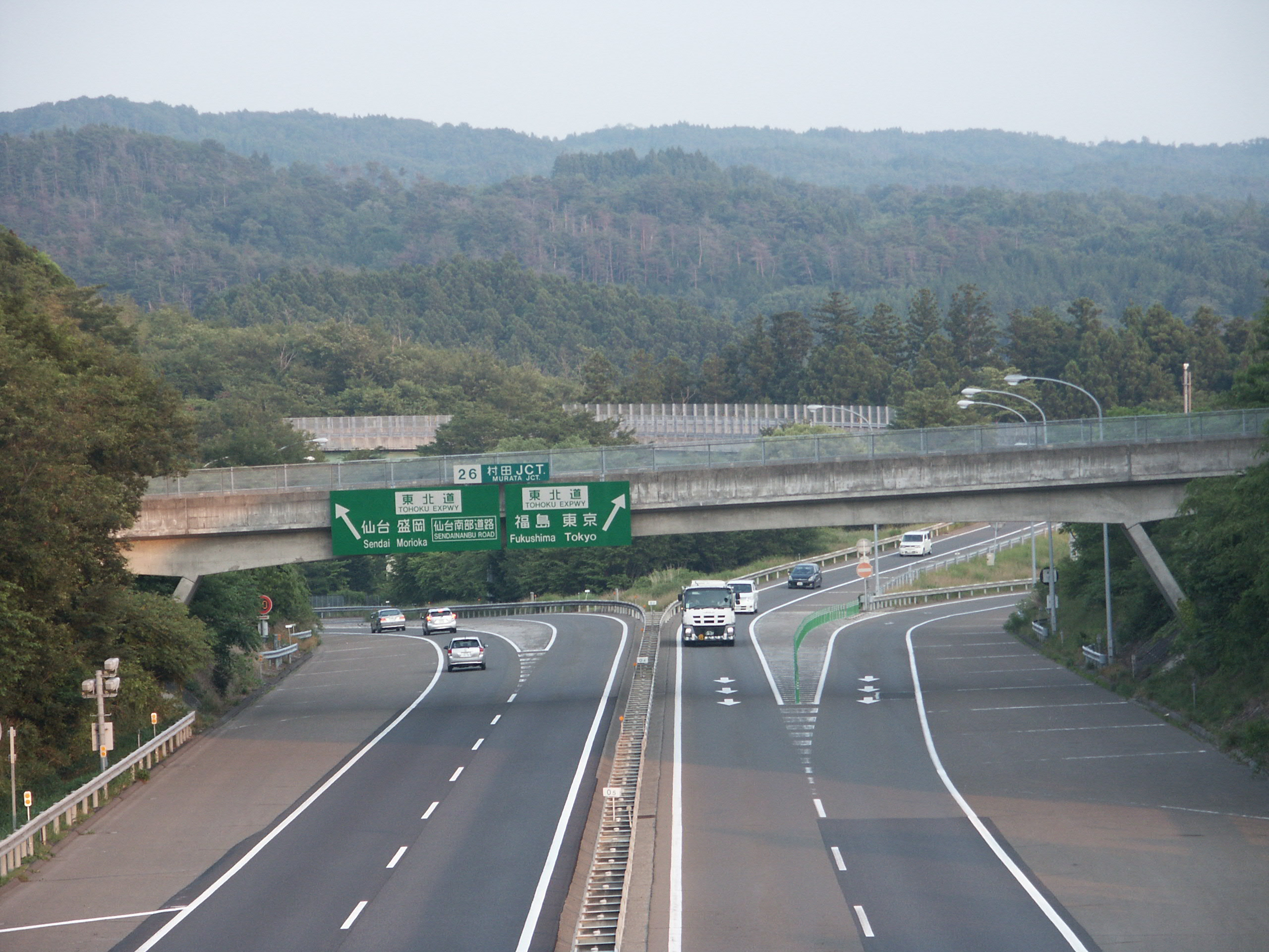 山形自動車道村田JCT付近